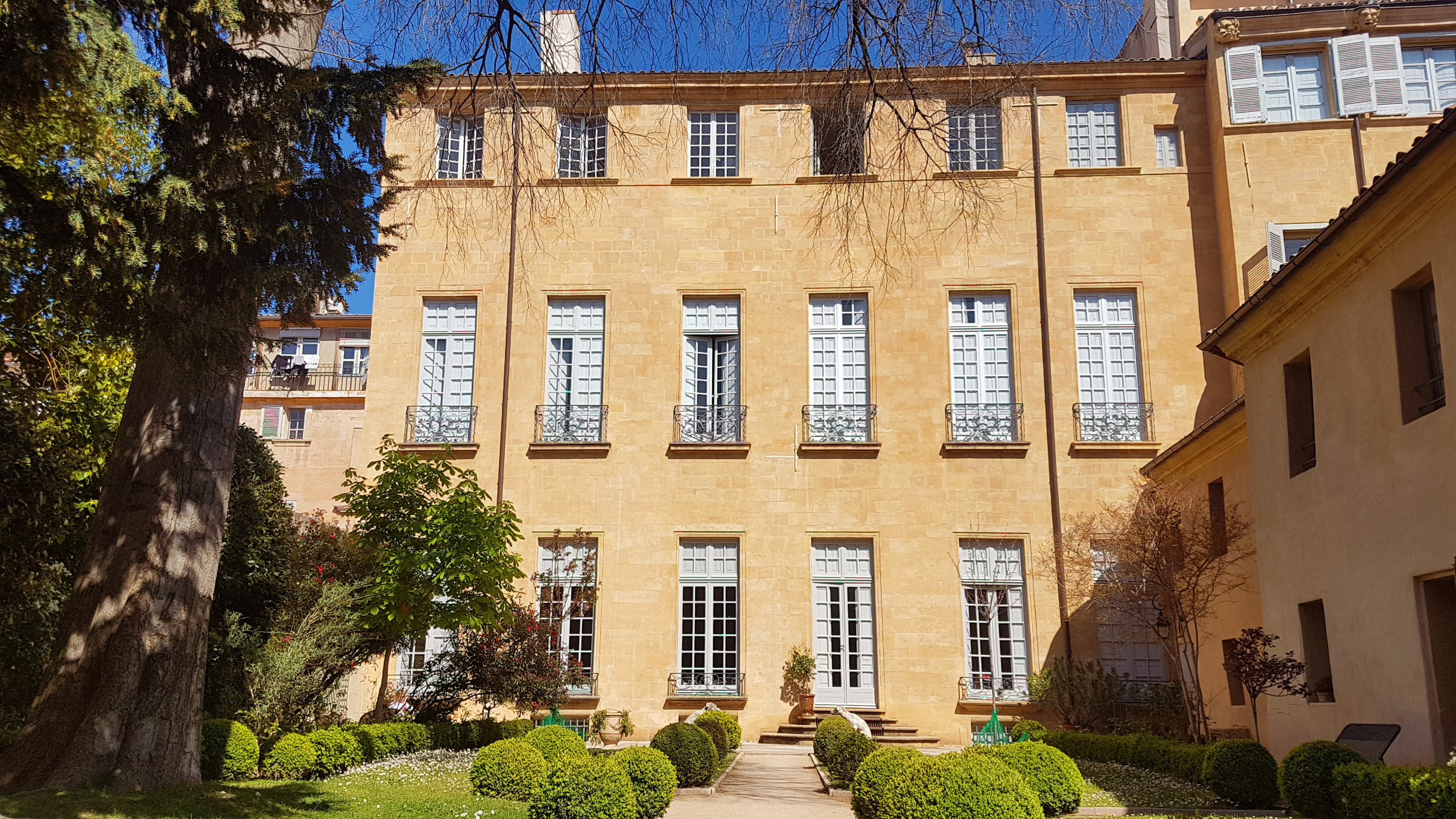 extérieurs de l'hotel arlatan-lauris